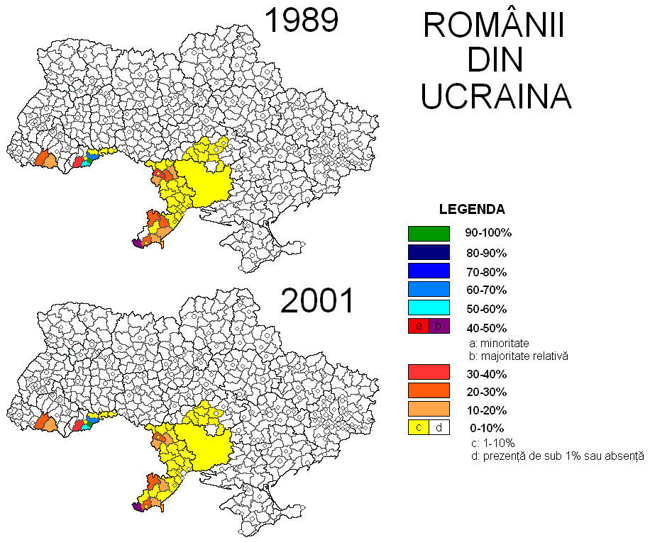 Românii-moldovenii din Ucraina conform recensămintelor din 1989 şi 2001. Sunt reprezentaţi pe raioane sau regiuni (în funcţie de disponibilitatea datelor.